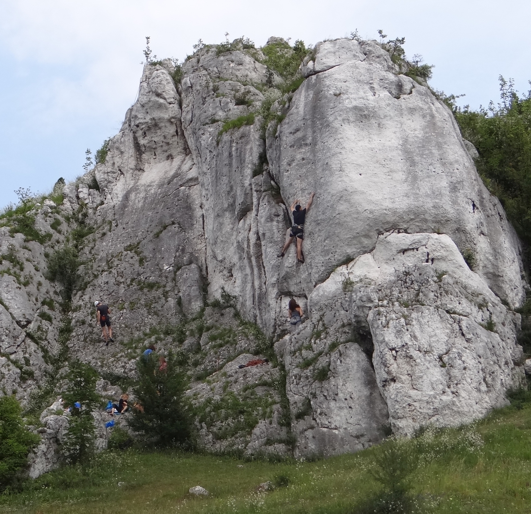 Skały Słoneczne przy Zamku w Olsztynie